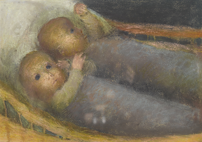 Zwillinge. Farbkreide-Zeichnung, 34,5 x 49 cm